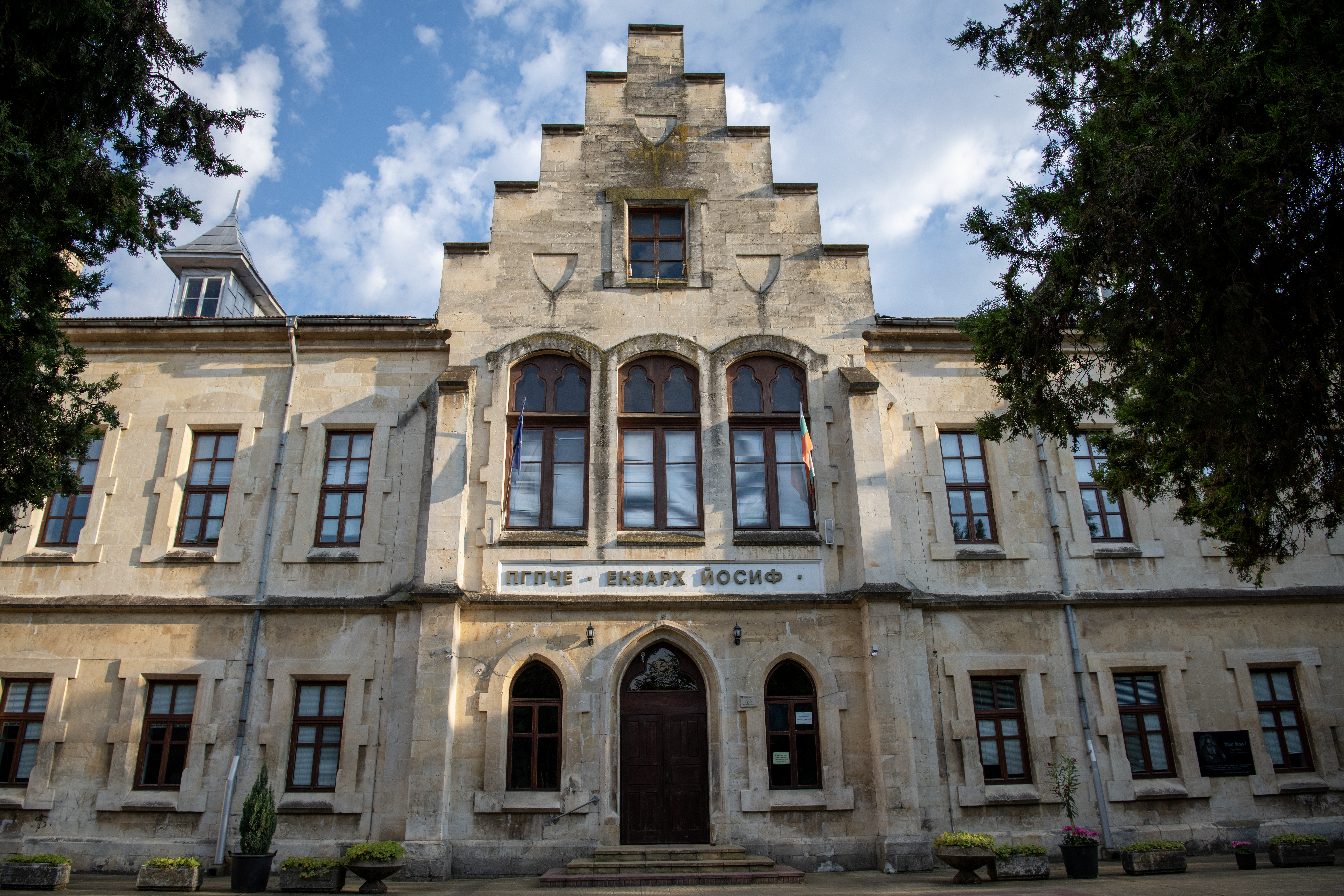 Снимката документира ГПЧЕ Екзарх Йосиф в град Разград.